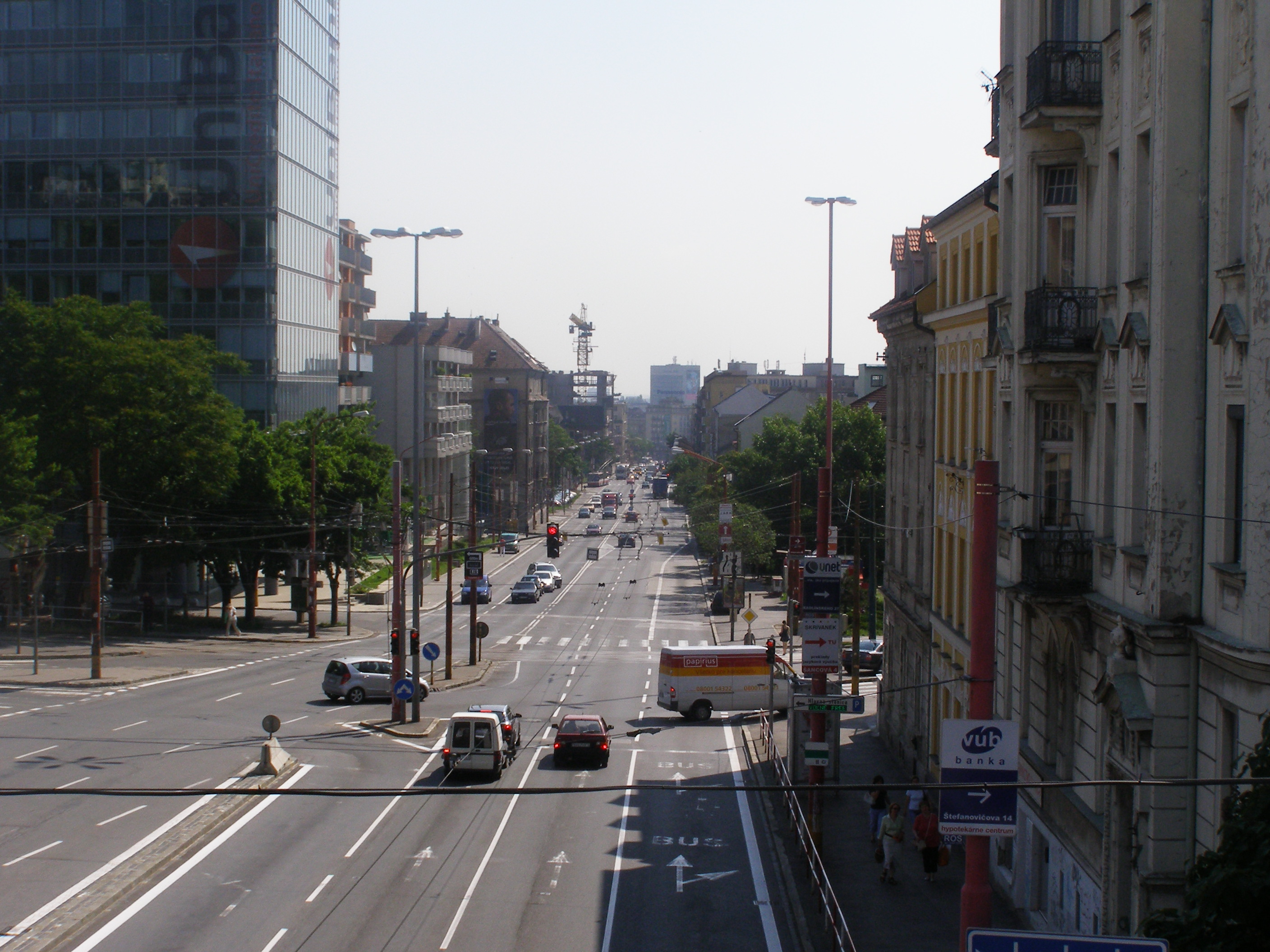 Šancová street, Bratislava